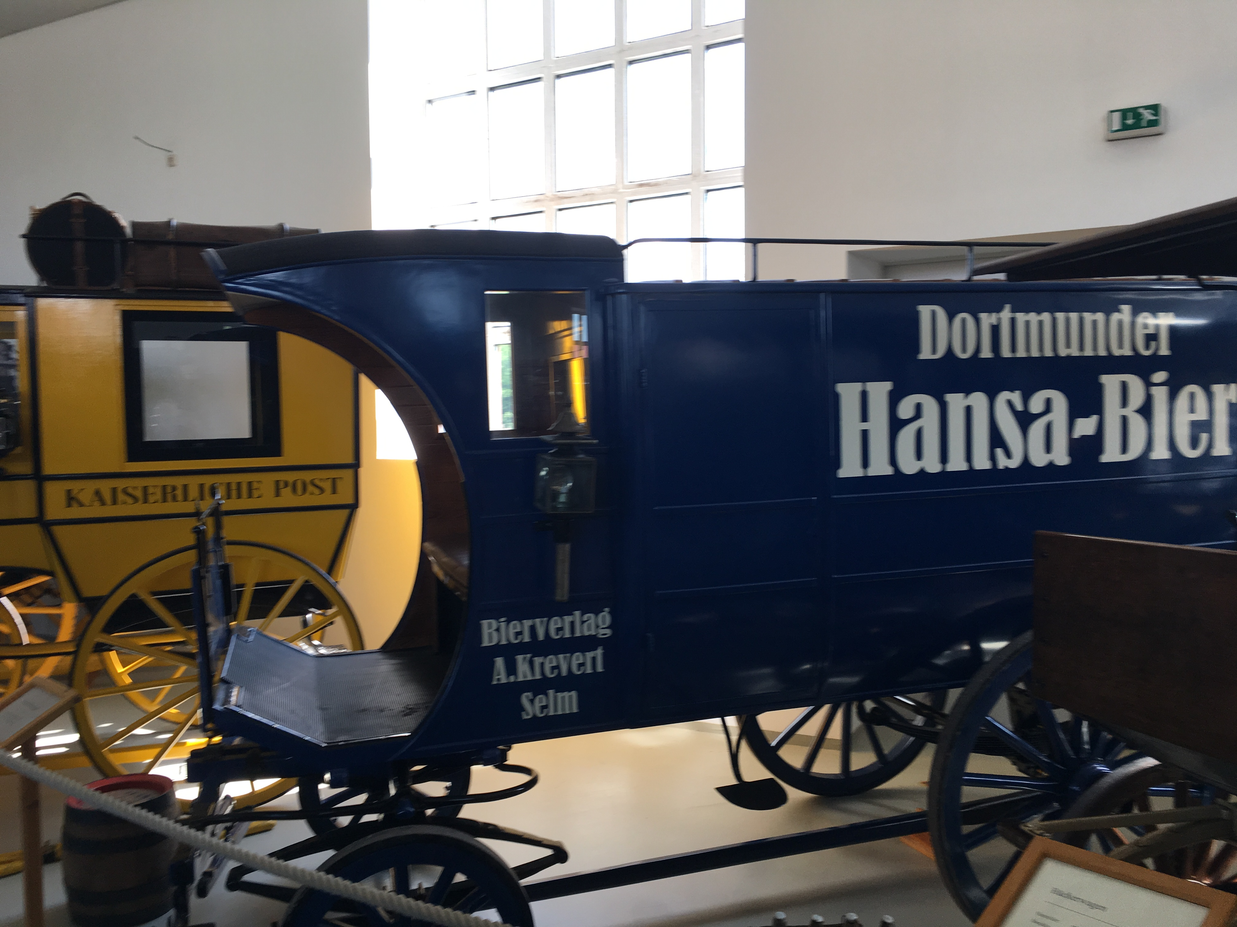 Mecklenburgisches Kutschenmuseum Kobrow